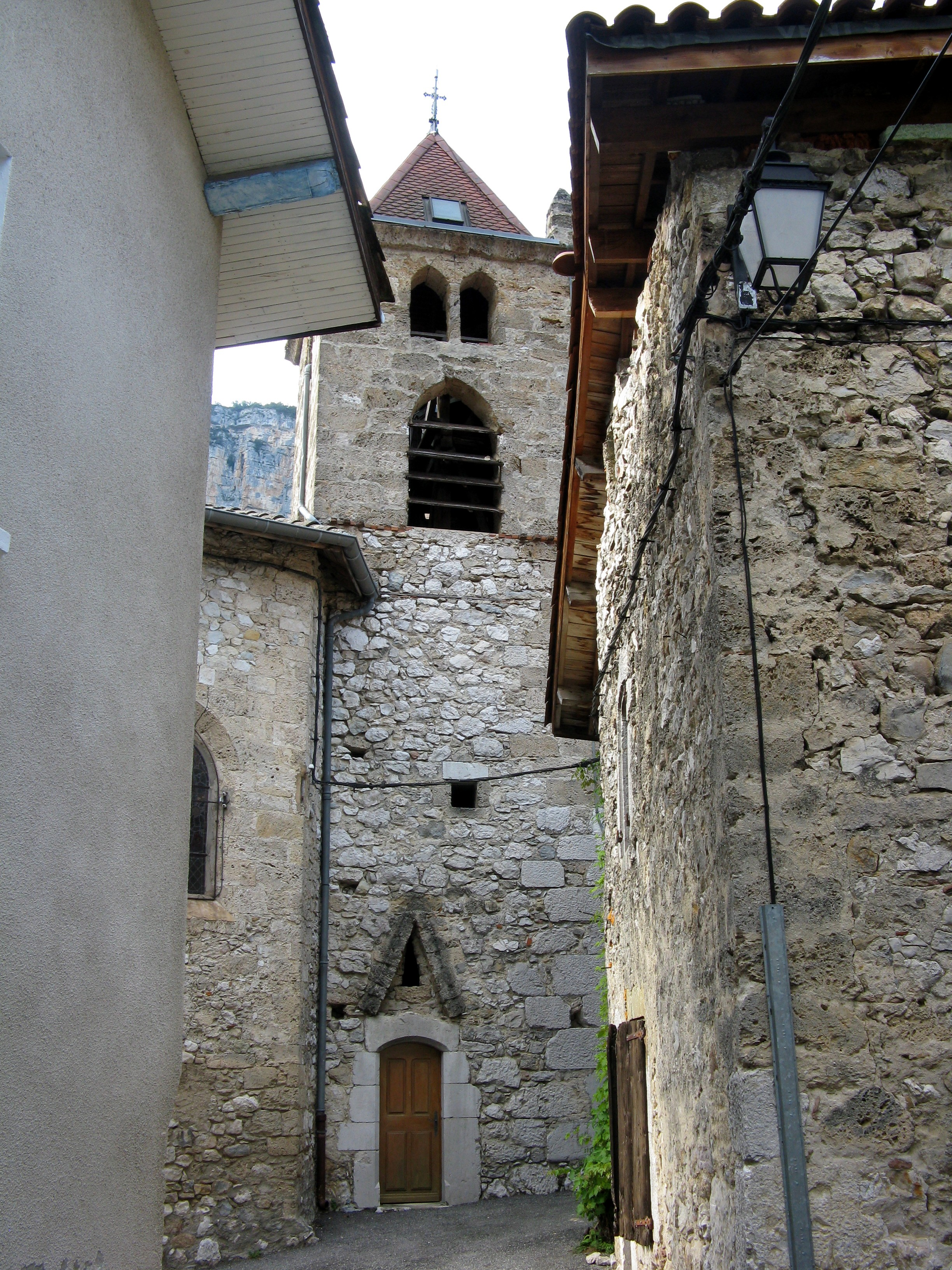 Choranche - Eglise